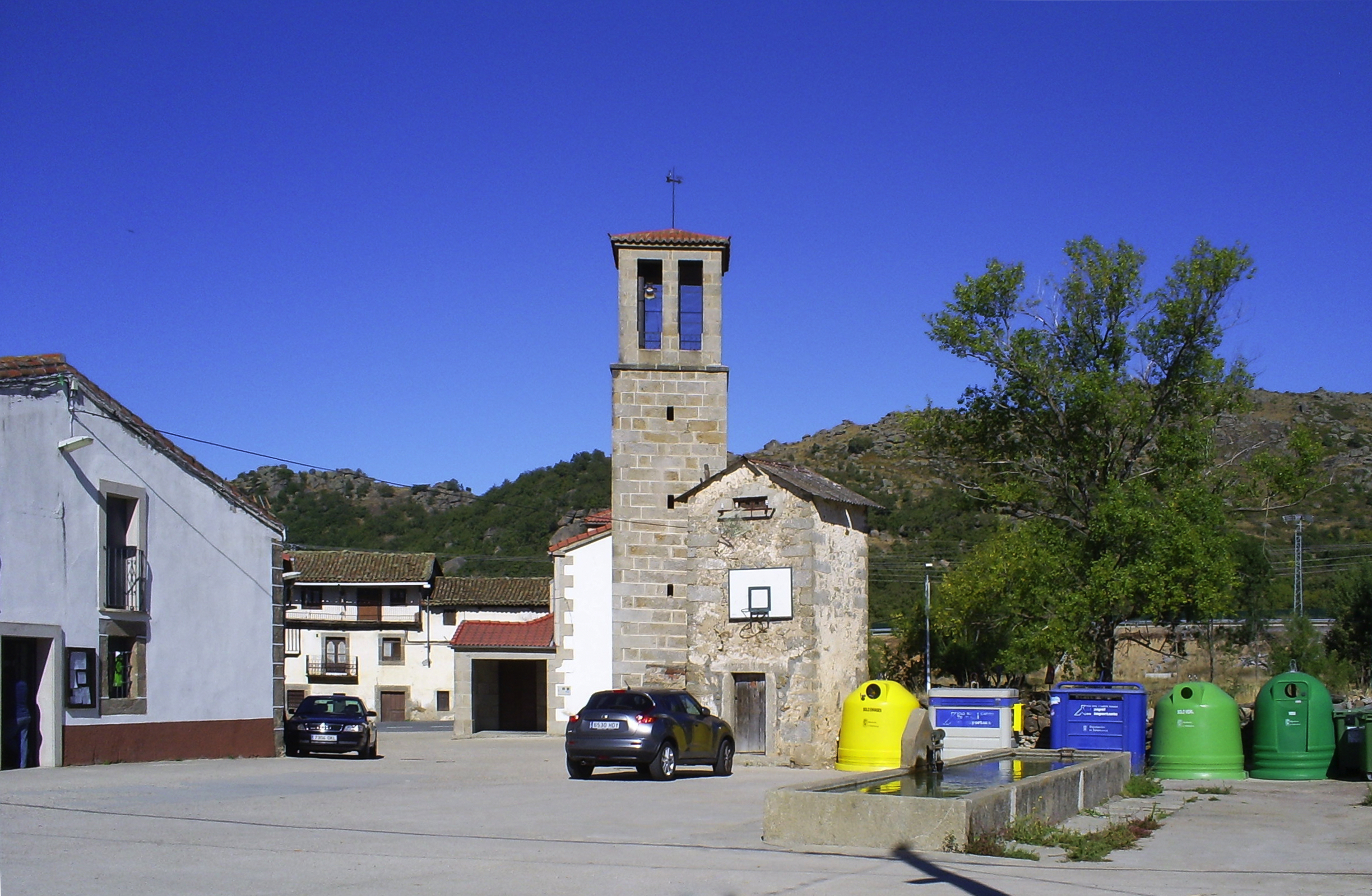 El ayuntamiento de vallejera a la izquierda y la iglesia en el centro